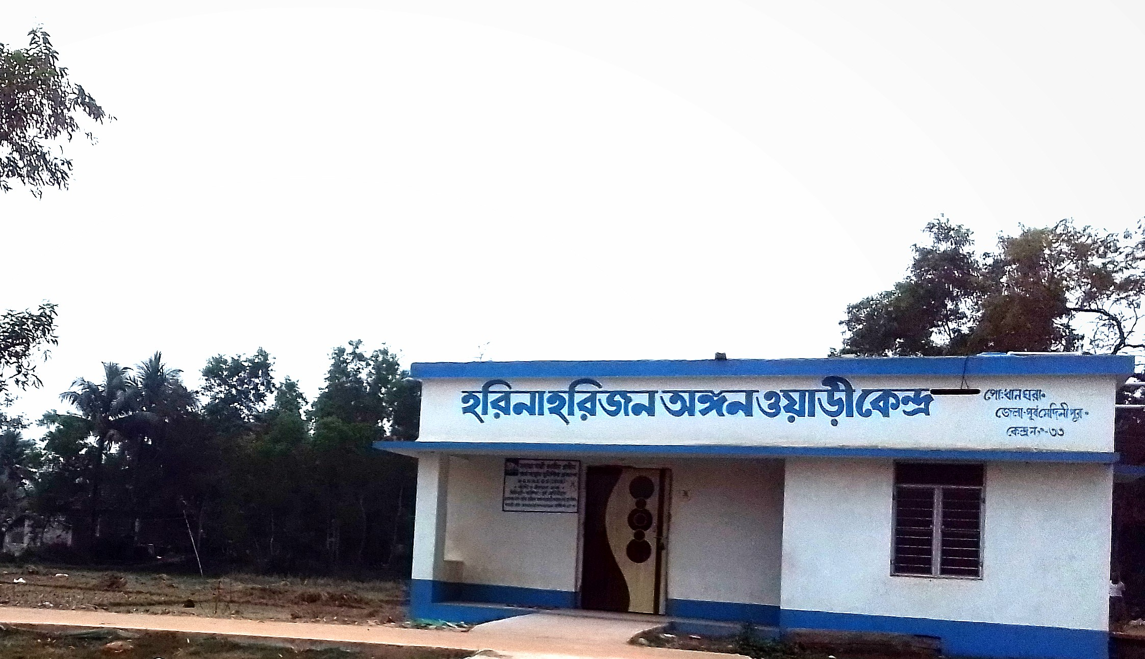 হরিণা পাশদল বাড়